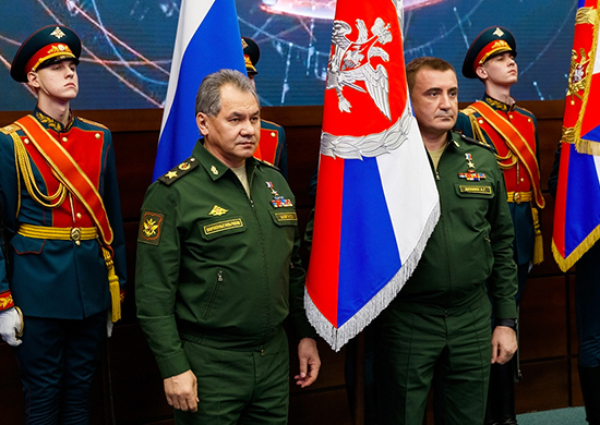 Вручение заместителю Министра обороны генерал-лейтенанту А. Г. Дюмину особо почётного персонифицированного знака — личного штандарта